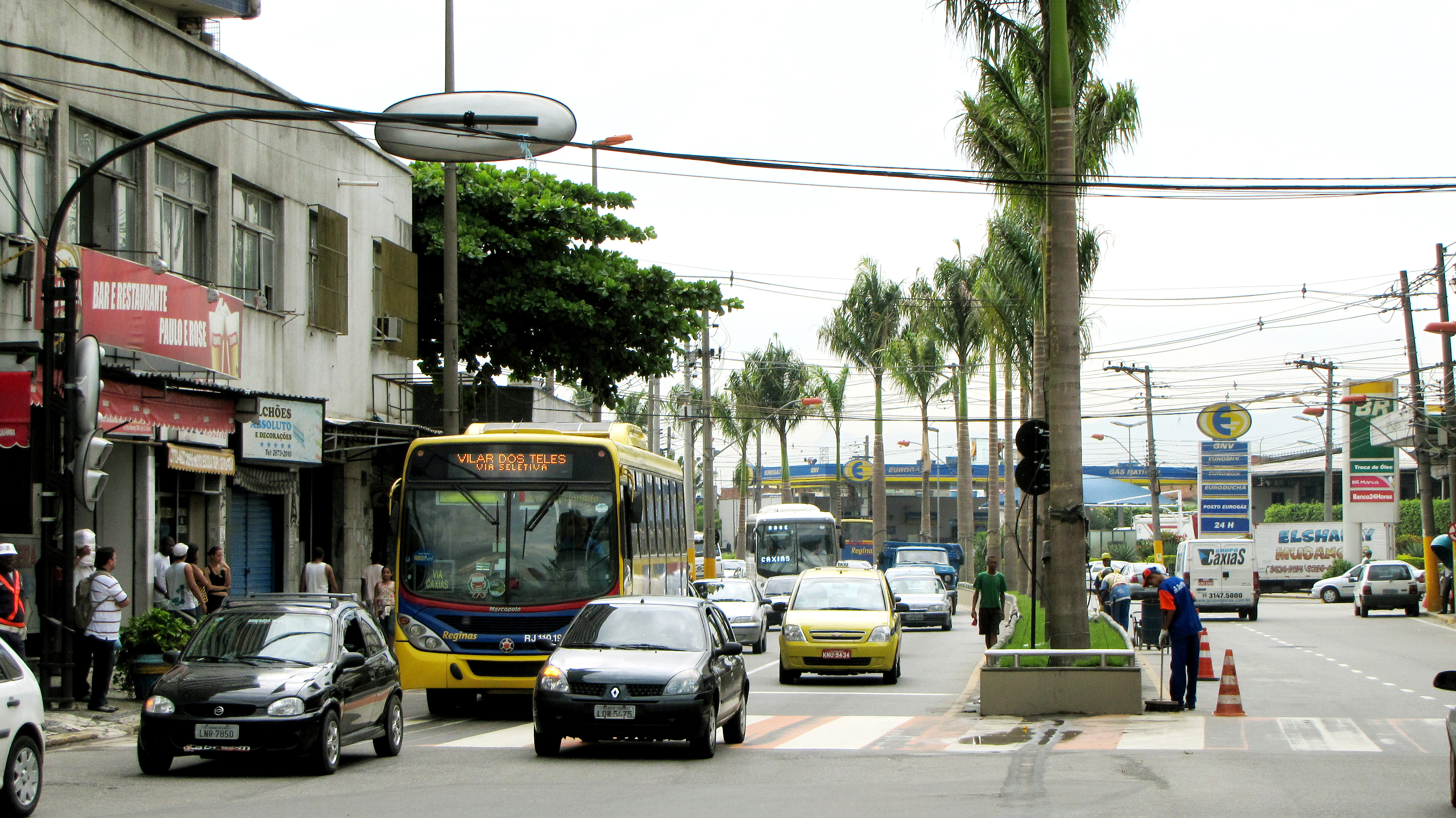 Novas Palmeiras no centro de Duque de Caxias na gestão do Prefeito Zito.